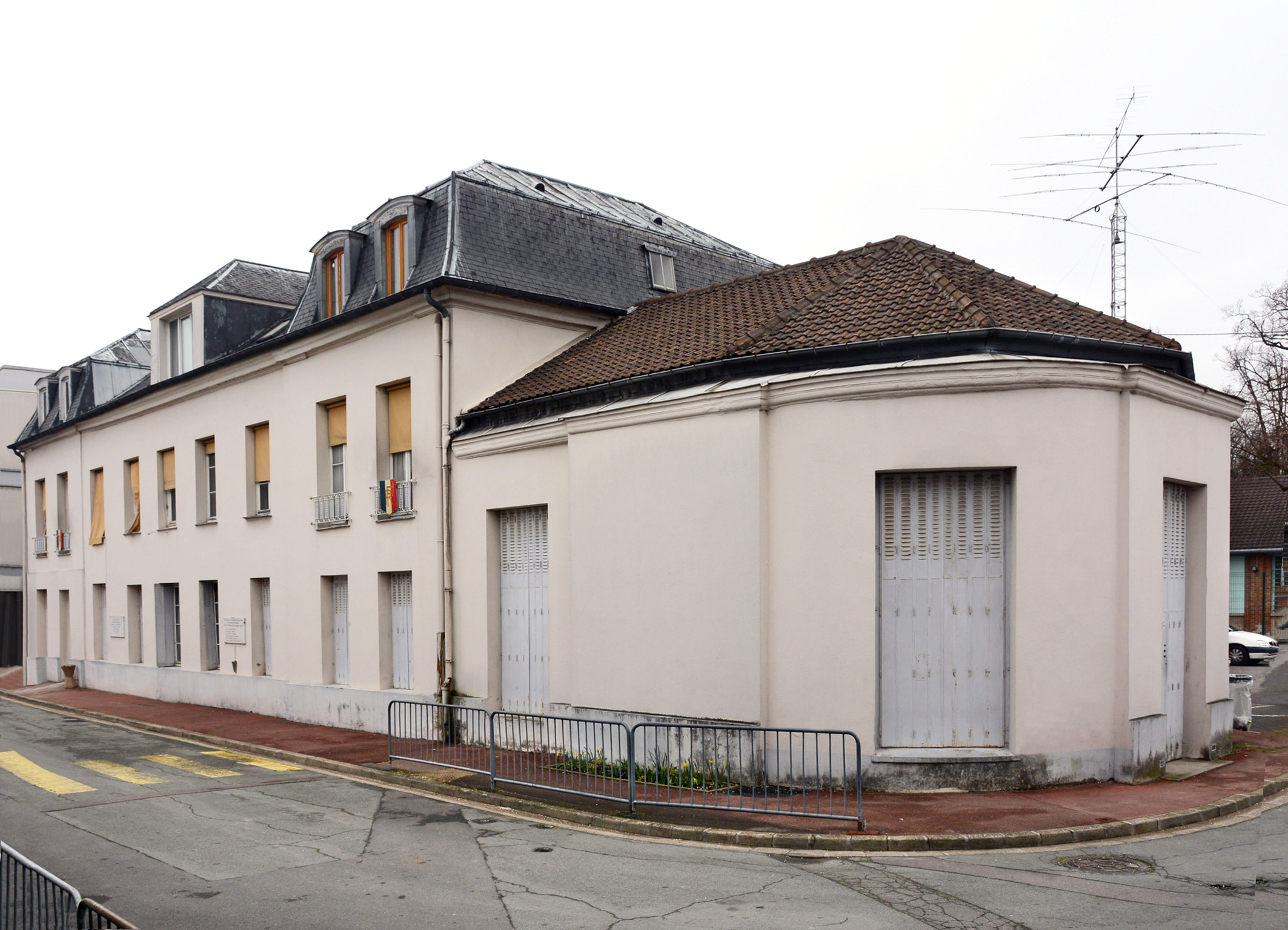 Ancienne mairie de Sevran. Ancienne résidence d'Alfred Nobel.